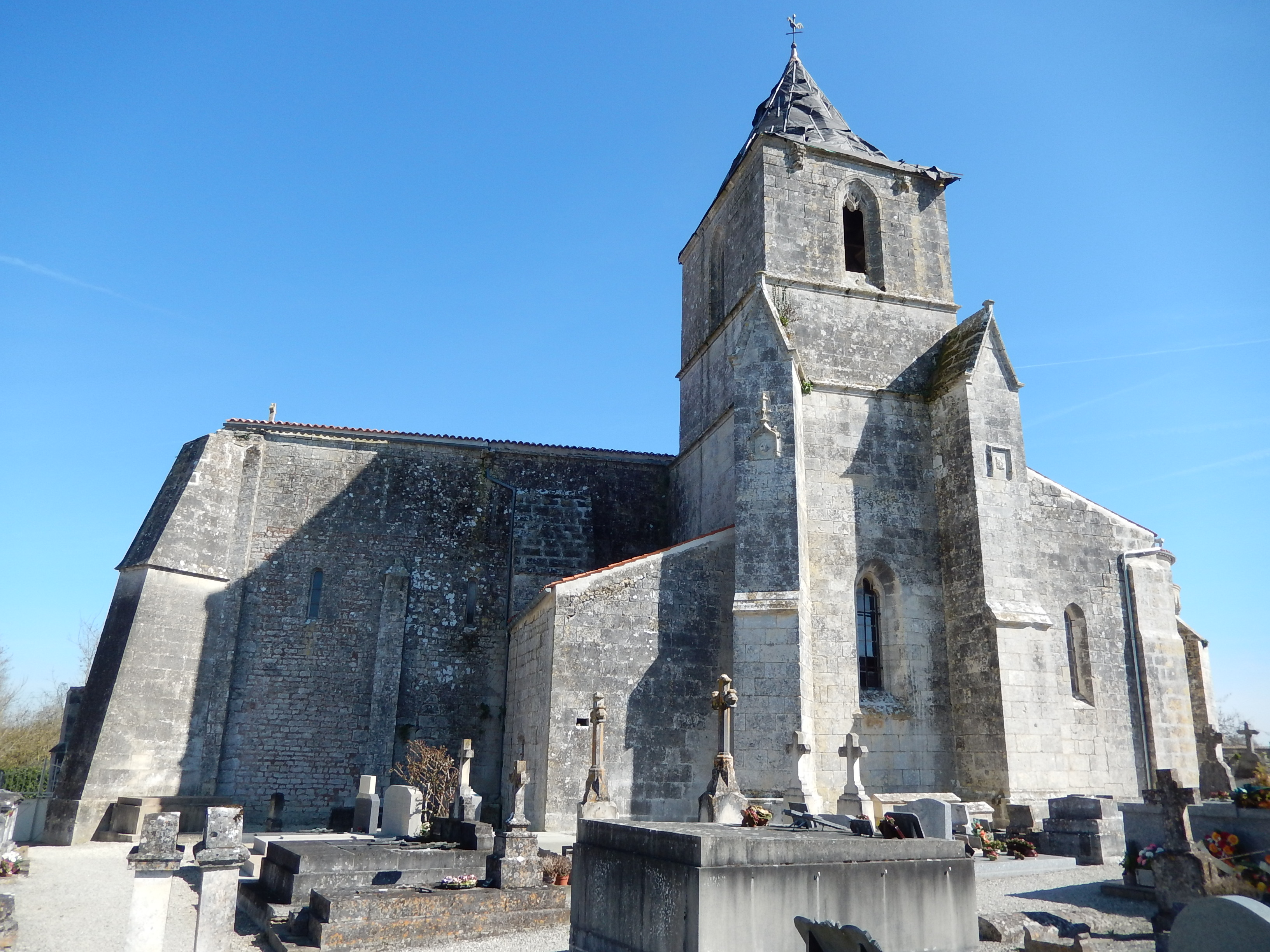 La façade sud-ouest de l'église Saint Pierre de Champdolent (Charente-Maritime, France).